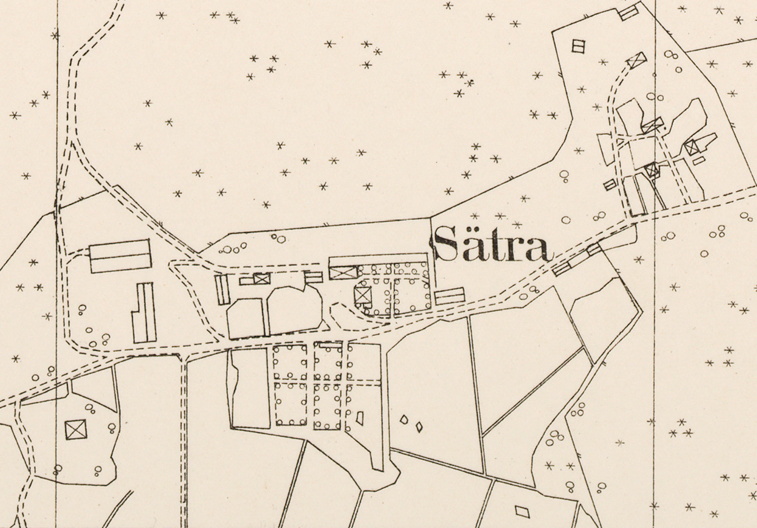 Del av 1912 års karta över Brännkyrka del 3 (Sätra och Bredäng) visande Sätra gård